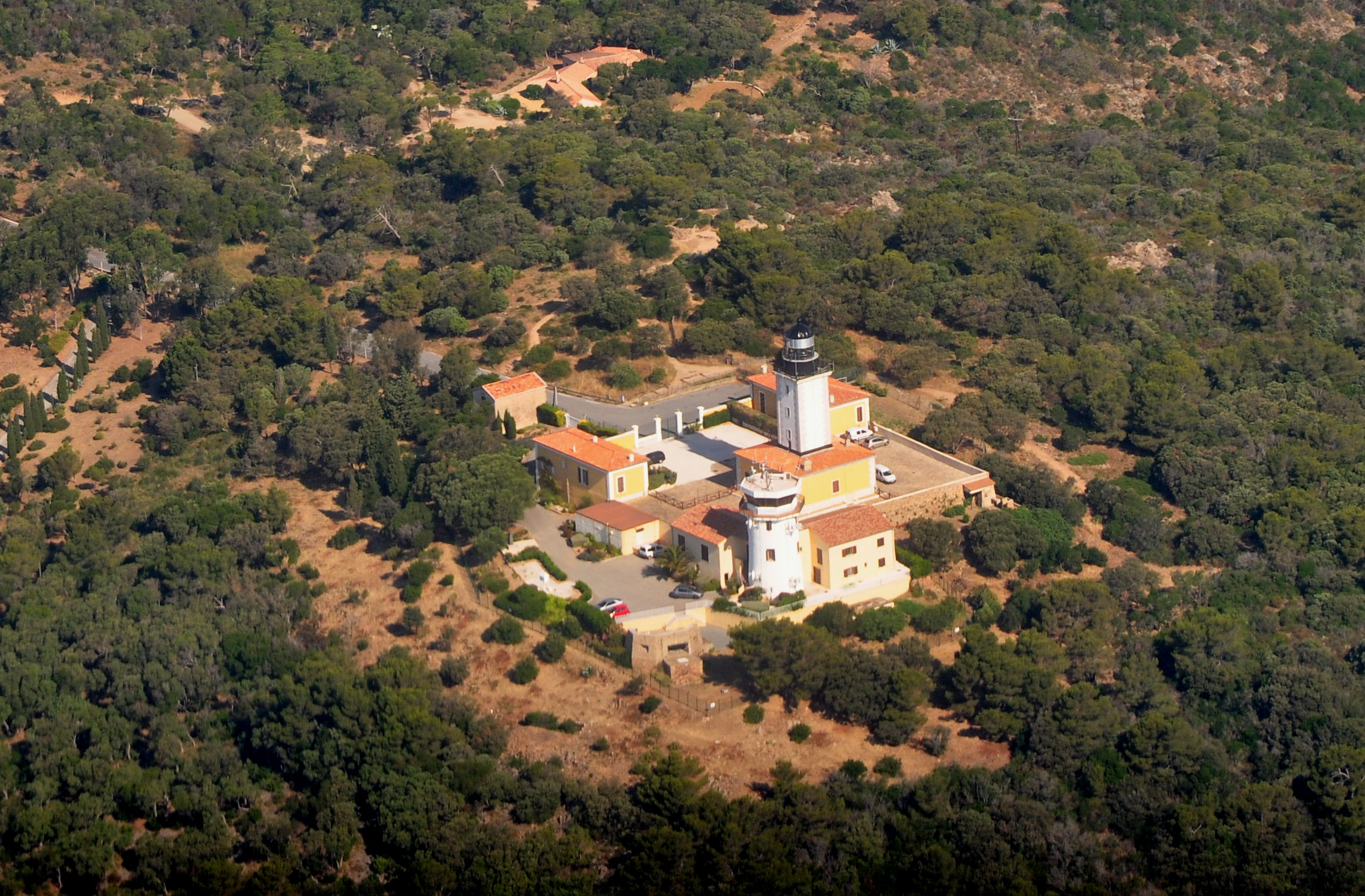 Vue aérienne de Cap Camarat (Ramatuelle)